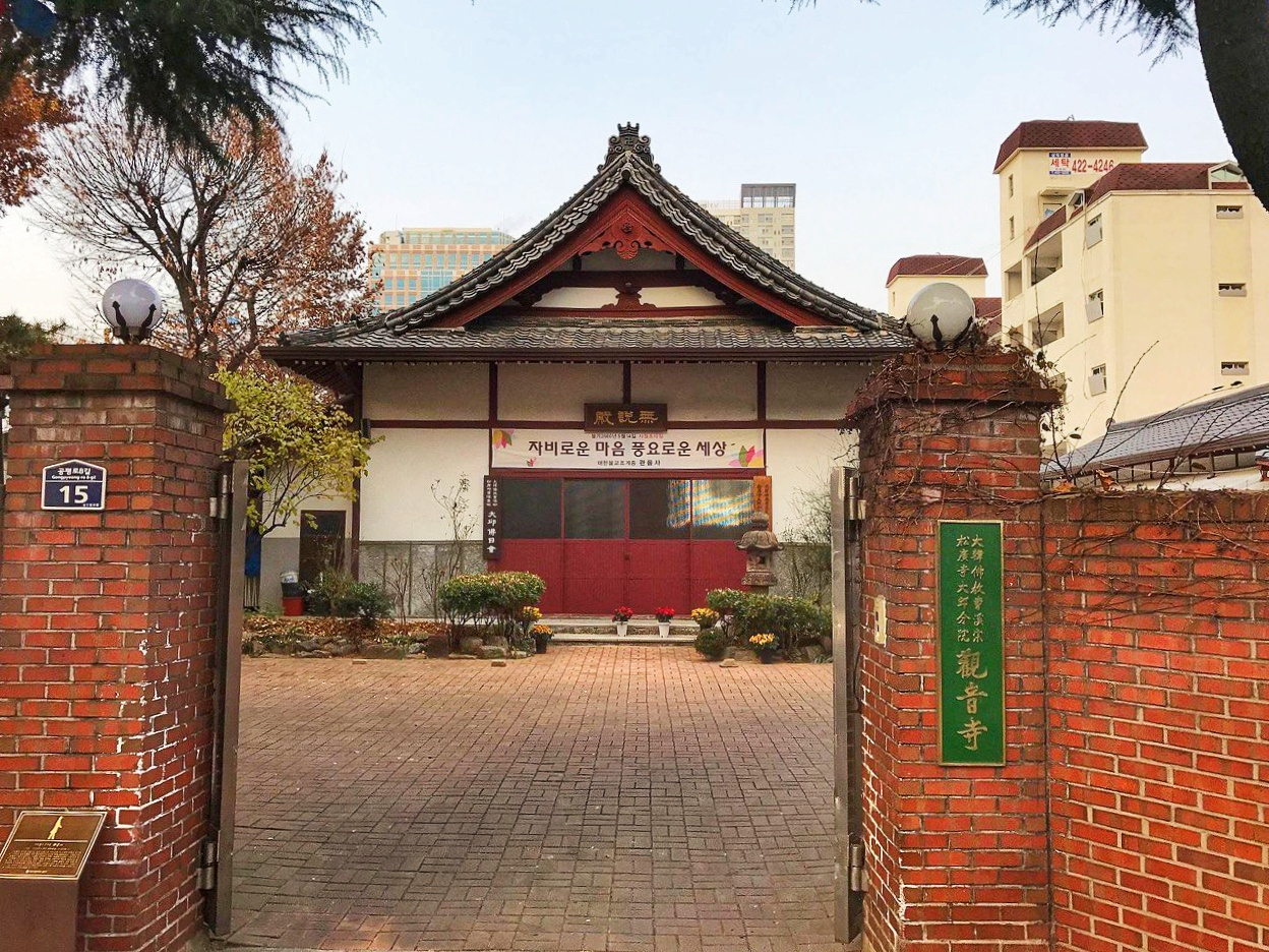 대구 중구 관음사 (1910년 동양척식주식회사에 의해 창건됨)